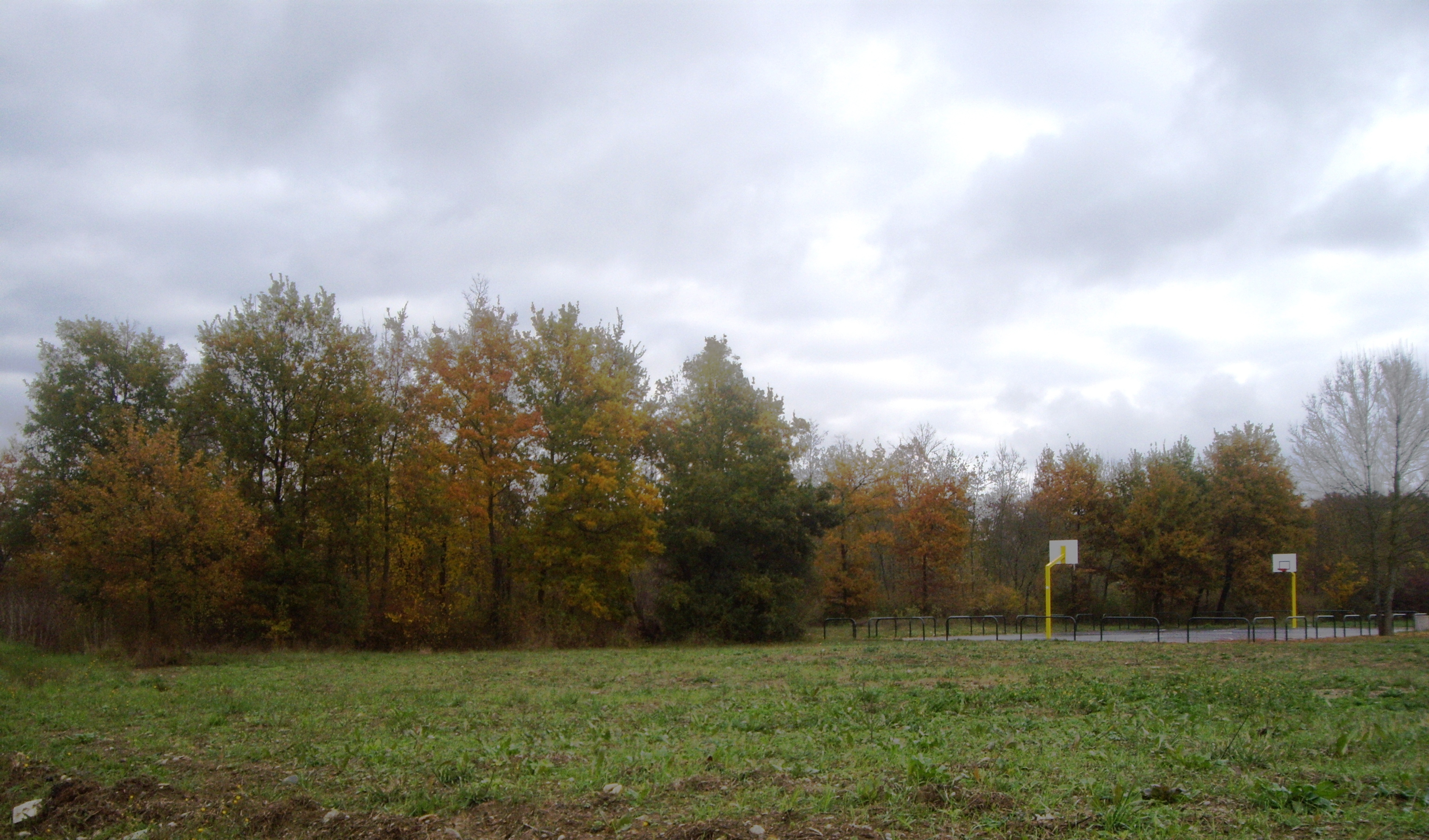 BOISDECLAIREFONTAINE